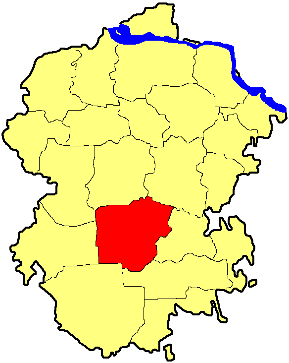 Ібресинський район Чувашії